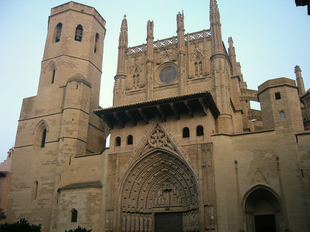 Estilo gótico, siglos XIII al XVI, mandada construir por el rey Jaime I de Aragón.